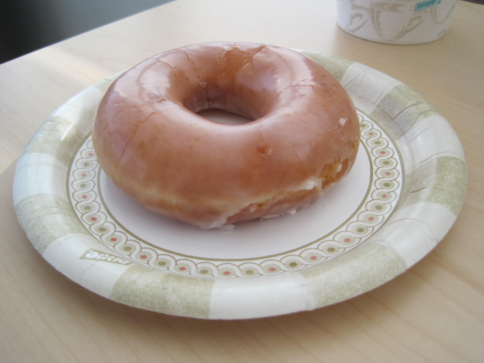 Un dónut con azúcar glass.